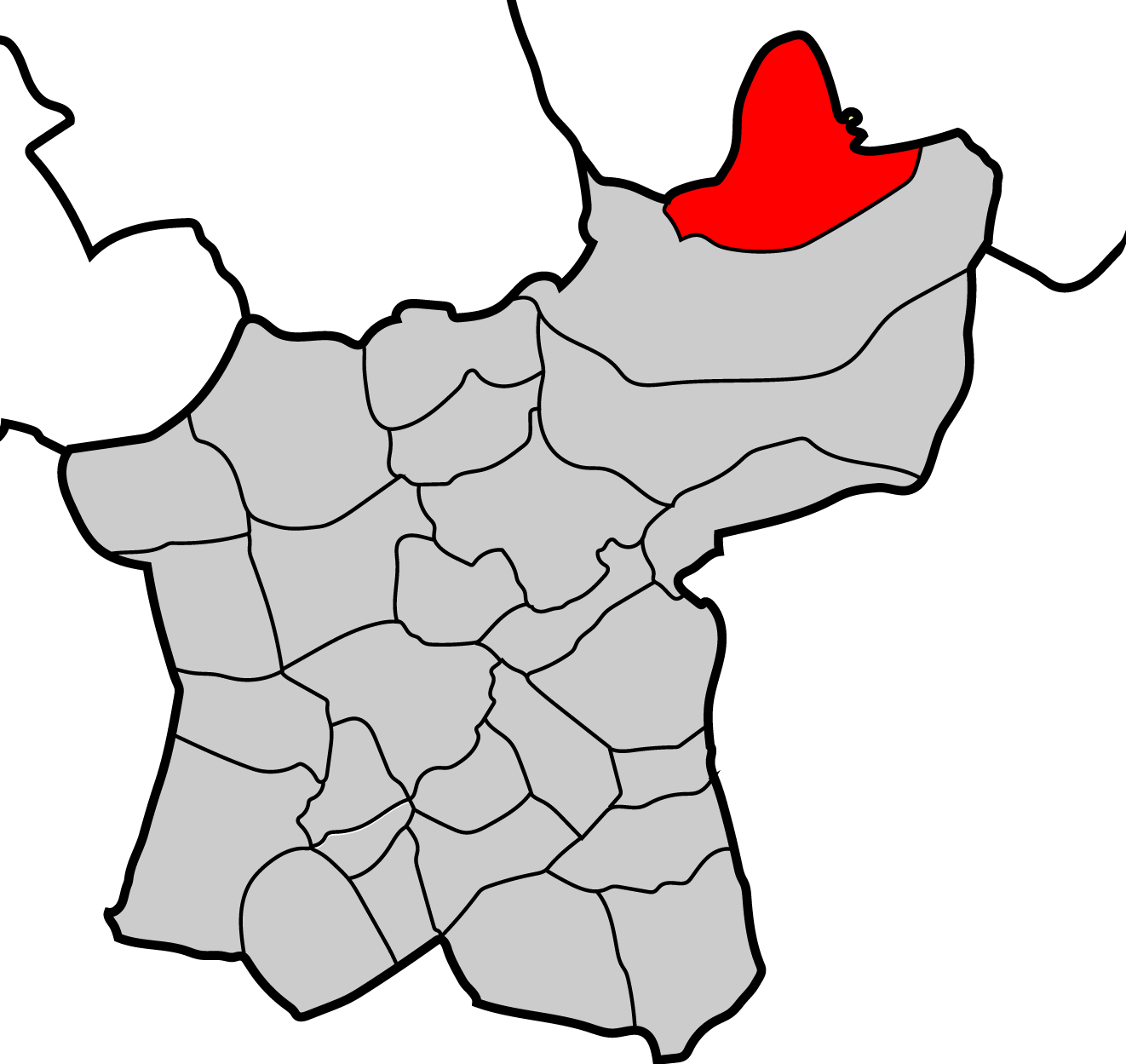 Mapa parroquia de Pedrafita de Camporredondo Baralla